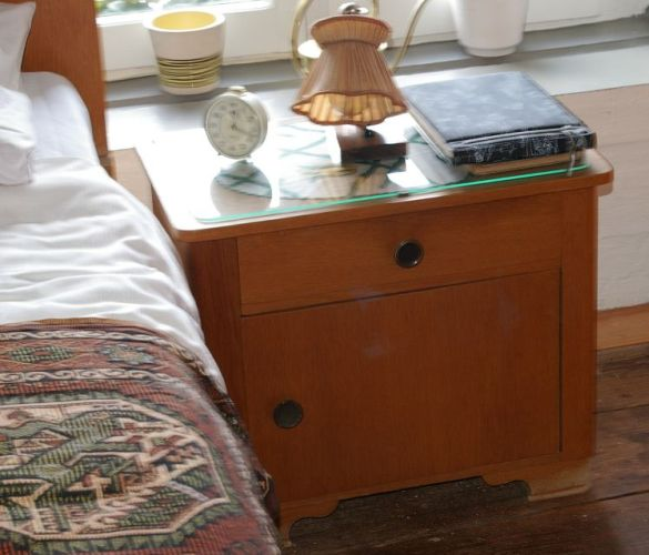 Nachttisch 30er Jahre